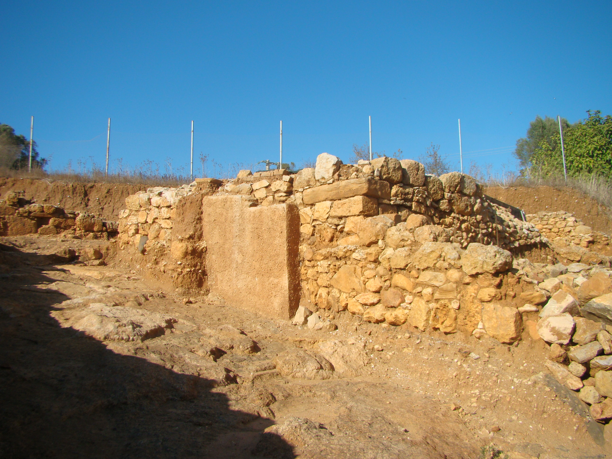 Monte Molião - Compartimento 3 - 08.11.2017